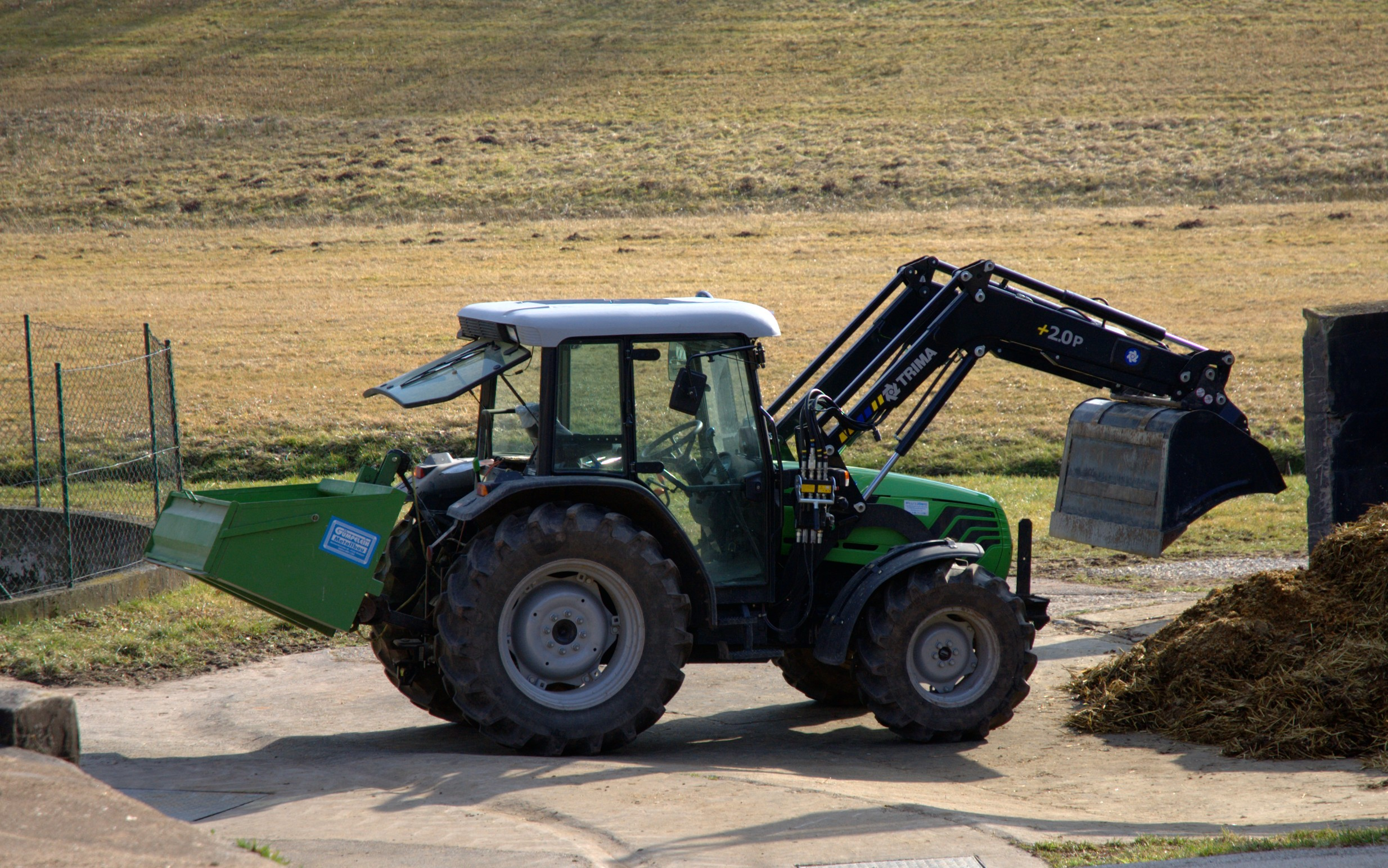 Deutz-Fahr-Traktor der Agroplus-Reihe mit Trima-Frontlader